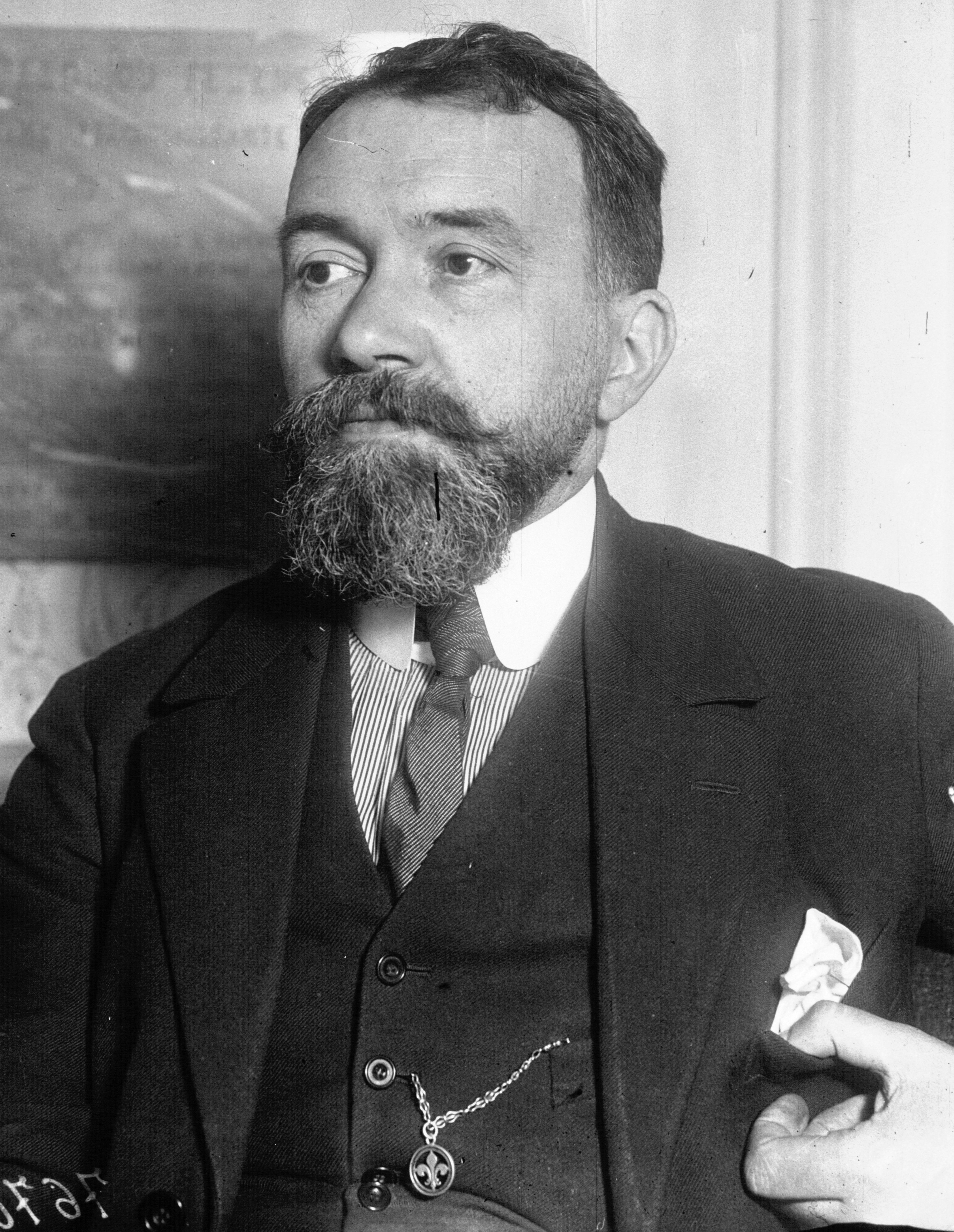 Maurice Pujo en 1919.